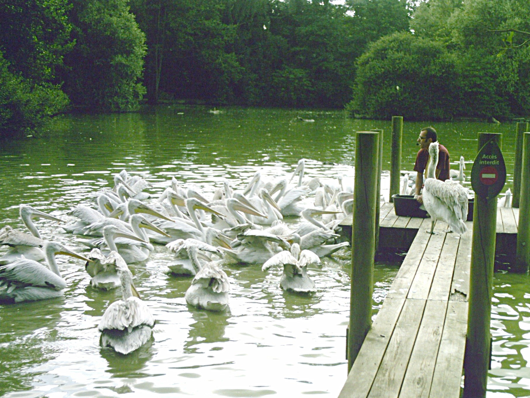 Nourrissage des pélicans au Parc des oiseaux de Villars-les-Dombes (Ain, France).